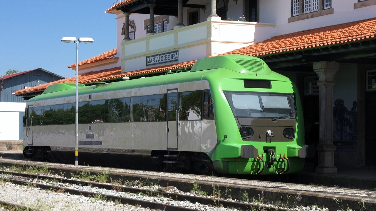 04 / Abr / 2009